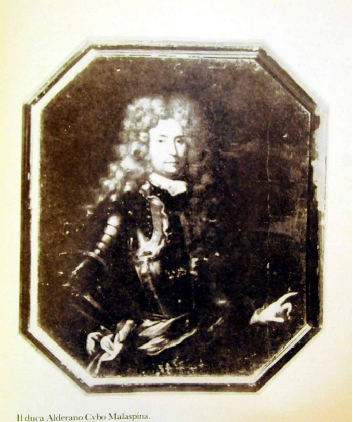 Ritratto di Alderano I Cybo-Malaspina